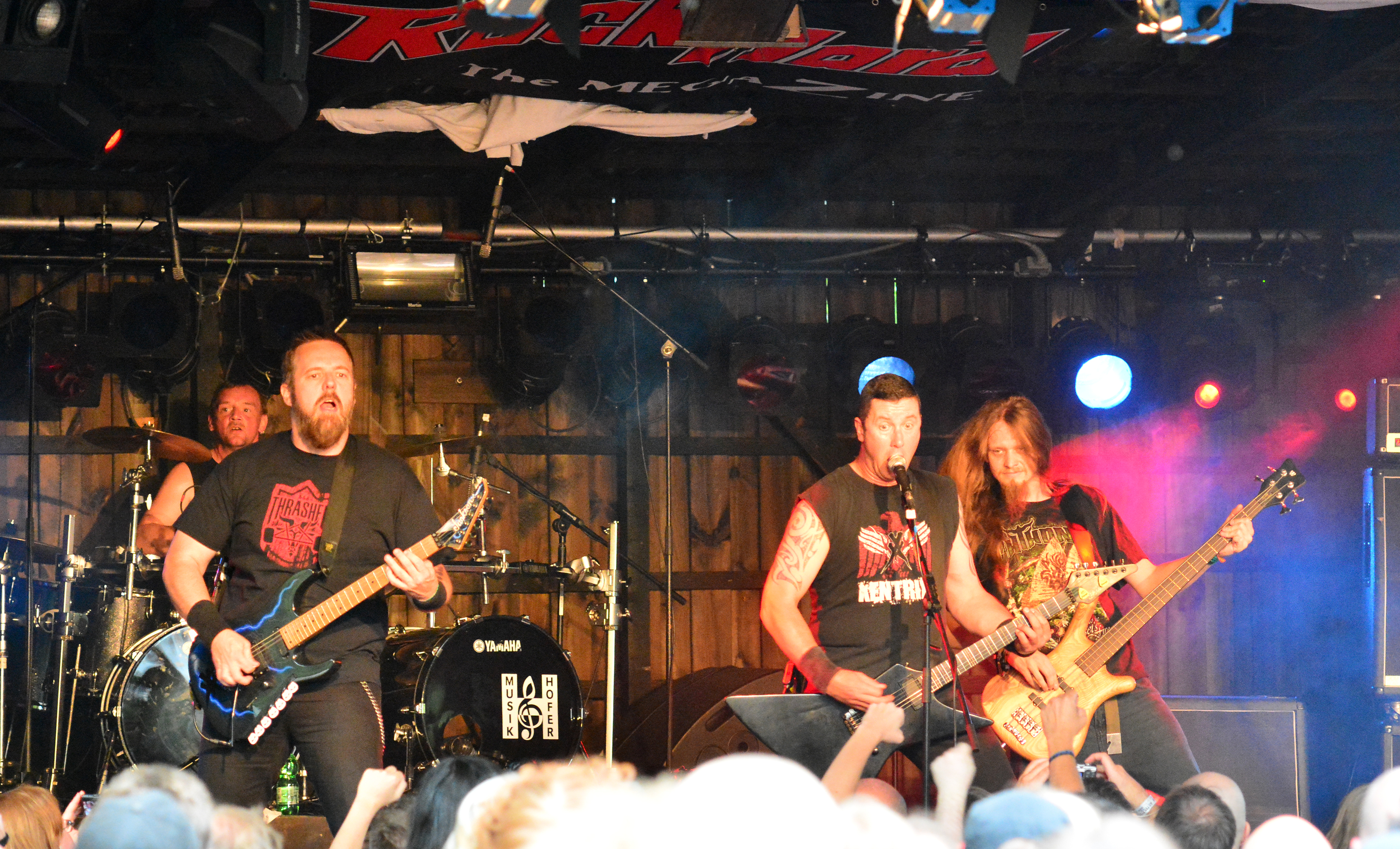 Xentrix beim Headbangers Open Air 2014